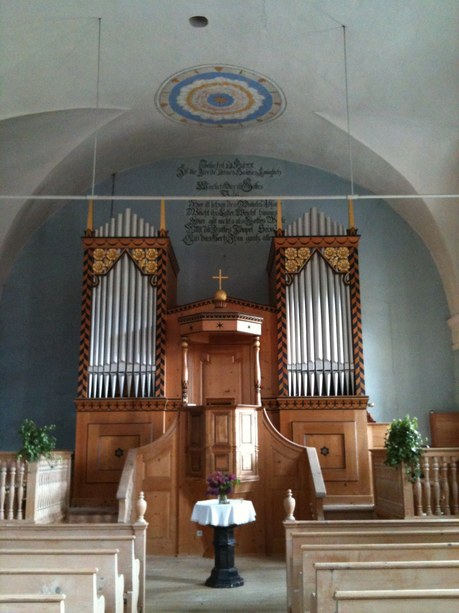 reformierte Kirche Fanas, Kanton Graubünden